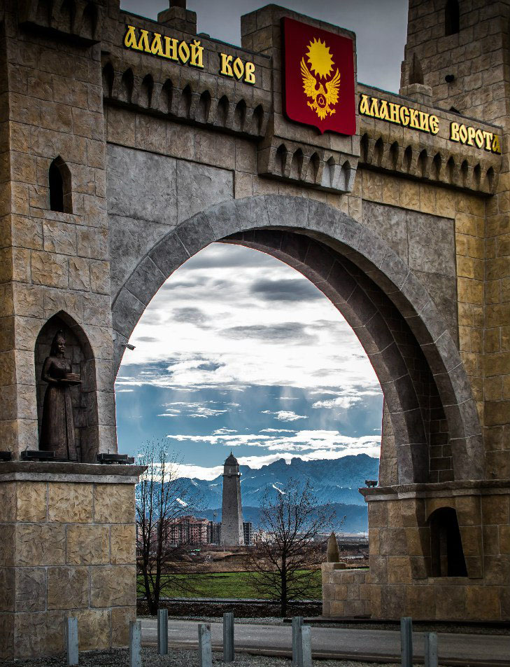 «Аланские ворота» — триумфальные въездные ворота Магаса — столицы Республики Ингушетия, возведённые в стиле древней ингушской башенной архитектуры.